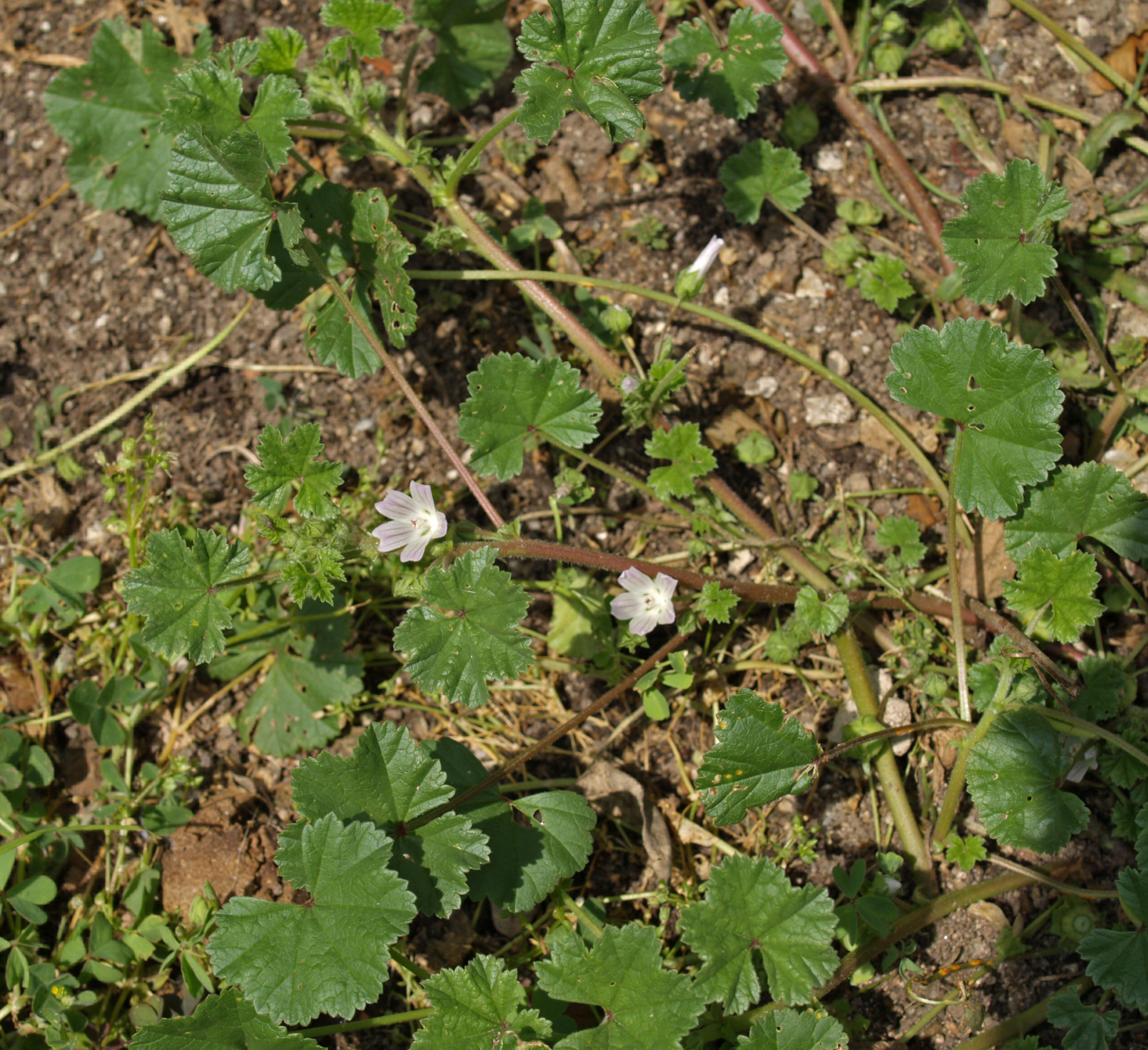 Malva neglecta, Madrid. 2007-04-28.